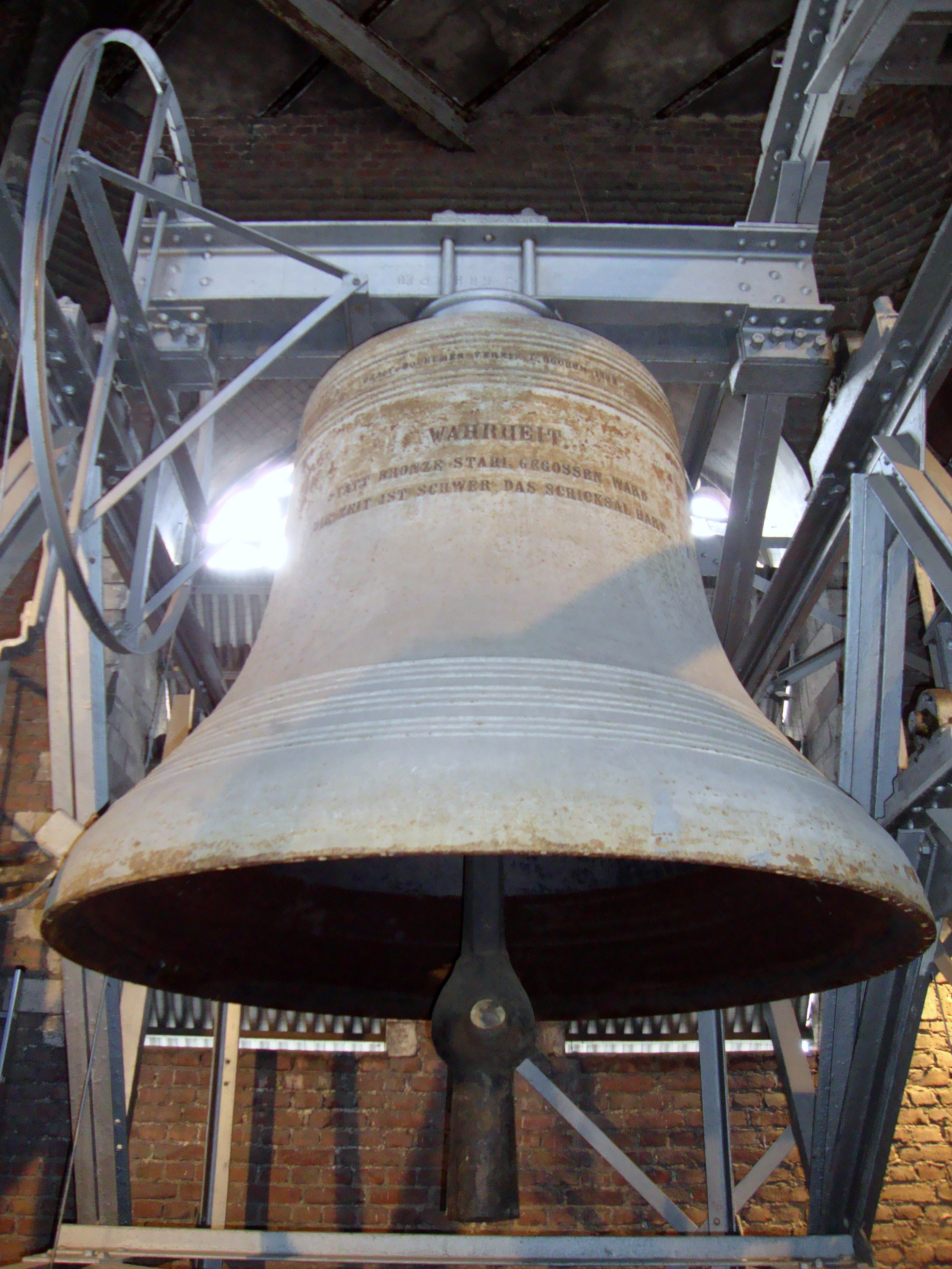 Köln, Christuskirche. Große Glocke, 1923, Bochumer Verein, Ø 1790 mm, Schlagton h0.